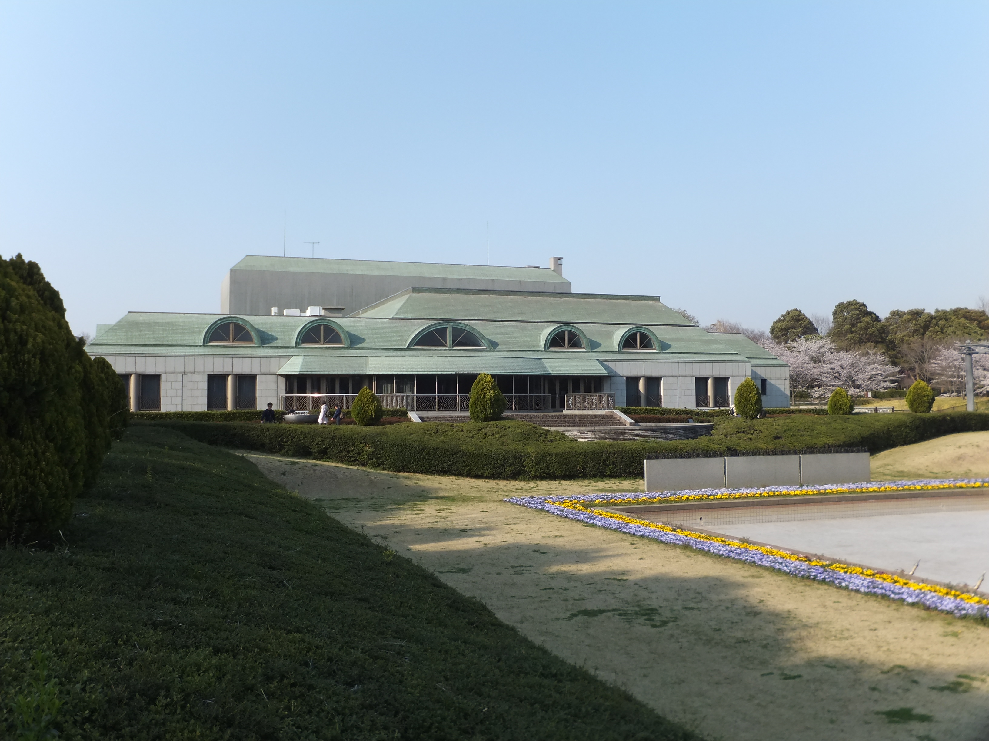 青葉の森公園芸術文化ホール （千葉市中央区）